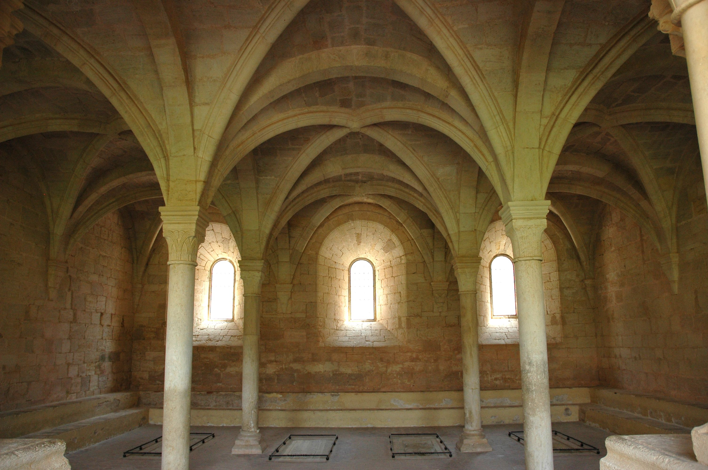 Monestir de Santes Creus - Sala capitular